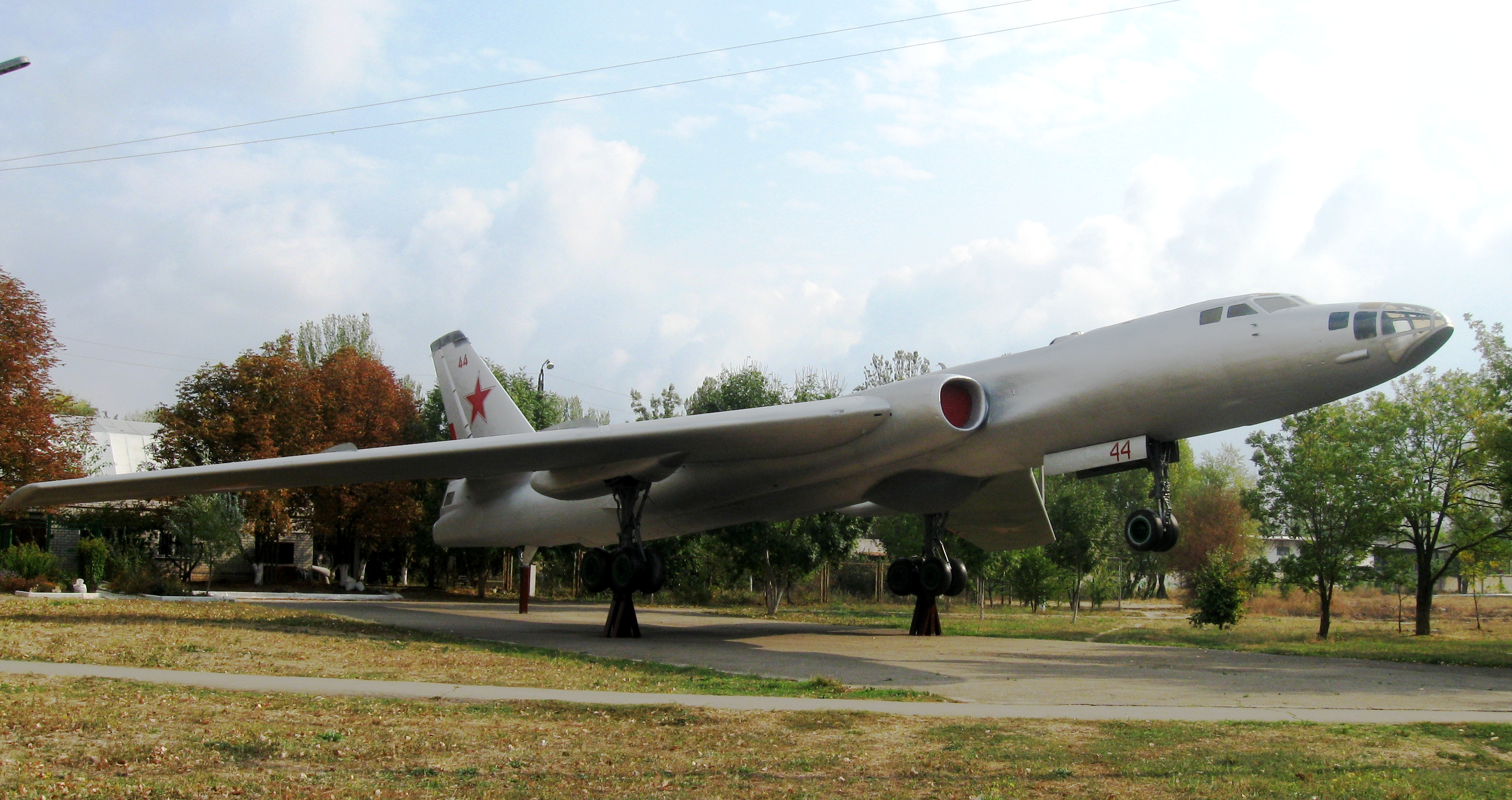 Пам'ятник-літак Ту-16РМ у мікрорайоні Кульбакіно м. Миколаєва біля входу на Кульбакинський авіаремонтний завод